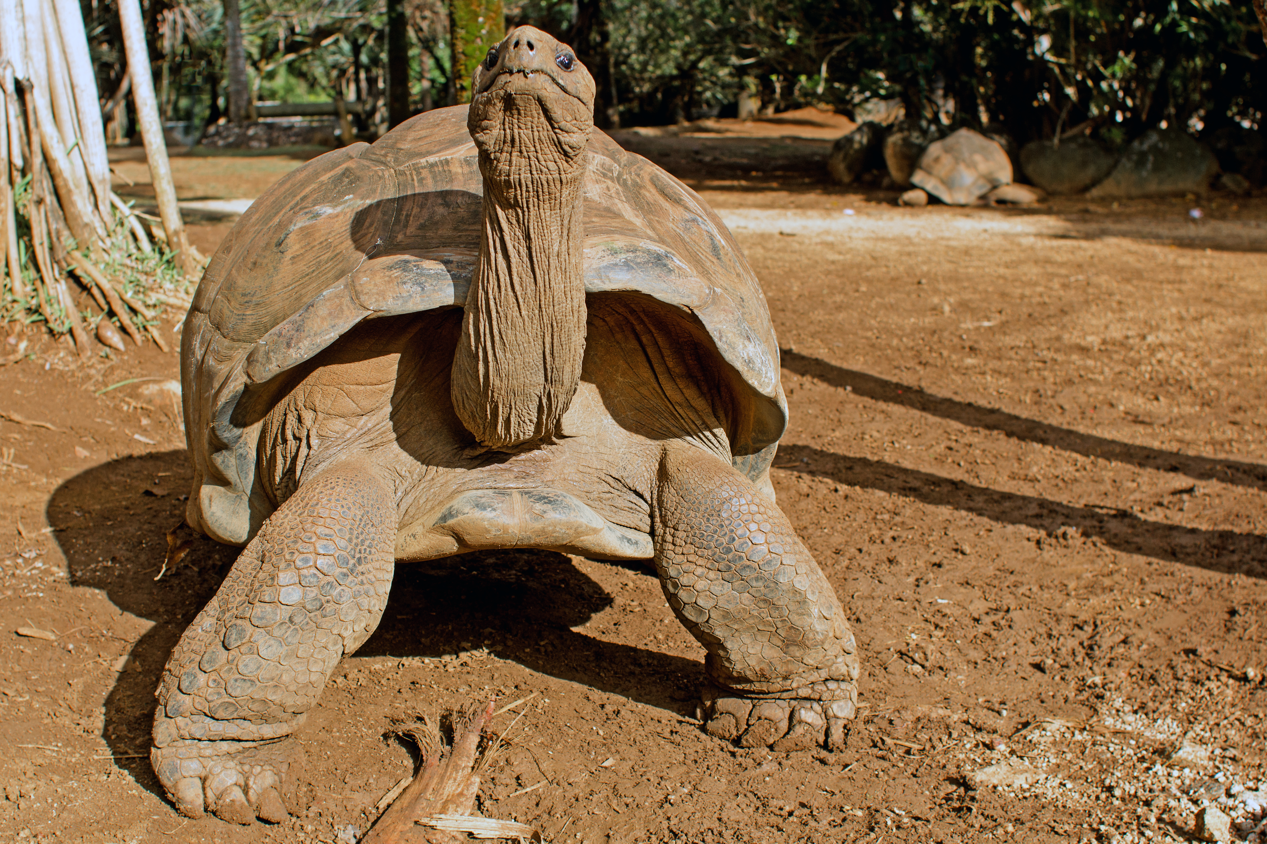 Giant Tortoise at La Vanille Reserve des Mascareignes